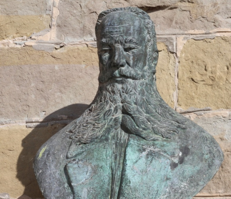 Büste Eugenio Geiringers (Foto von Ute Müller)